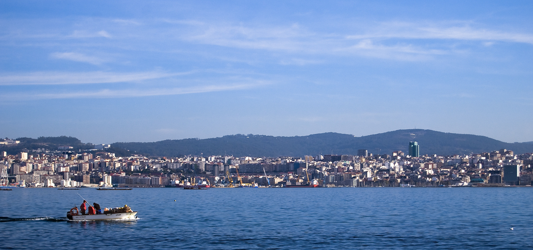 Ría de Vigo. Galiza